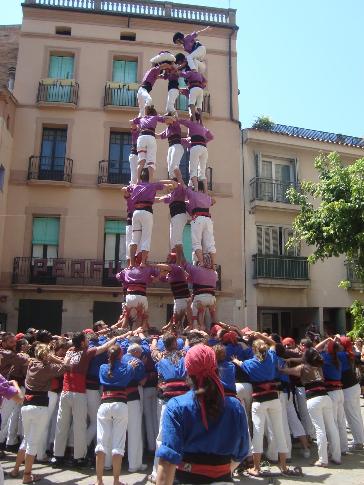 5d7 dels Moixiganguers d'Igualada. Data 2011-07-10 . Lloc: Igualada- Plaça Pius XII. Motiu: Actuació Aniversari Cal Tabola.